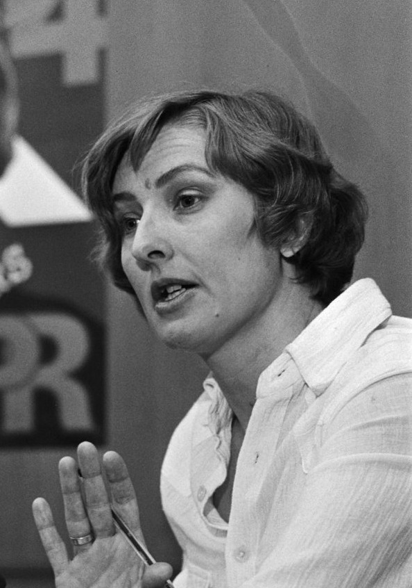 PPR-partijraad in de RAI te Amsterdam. Ria Beckers aan het woord